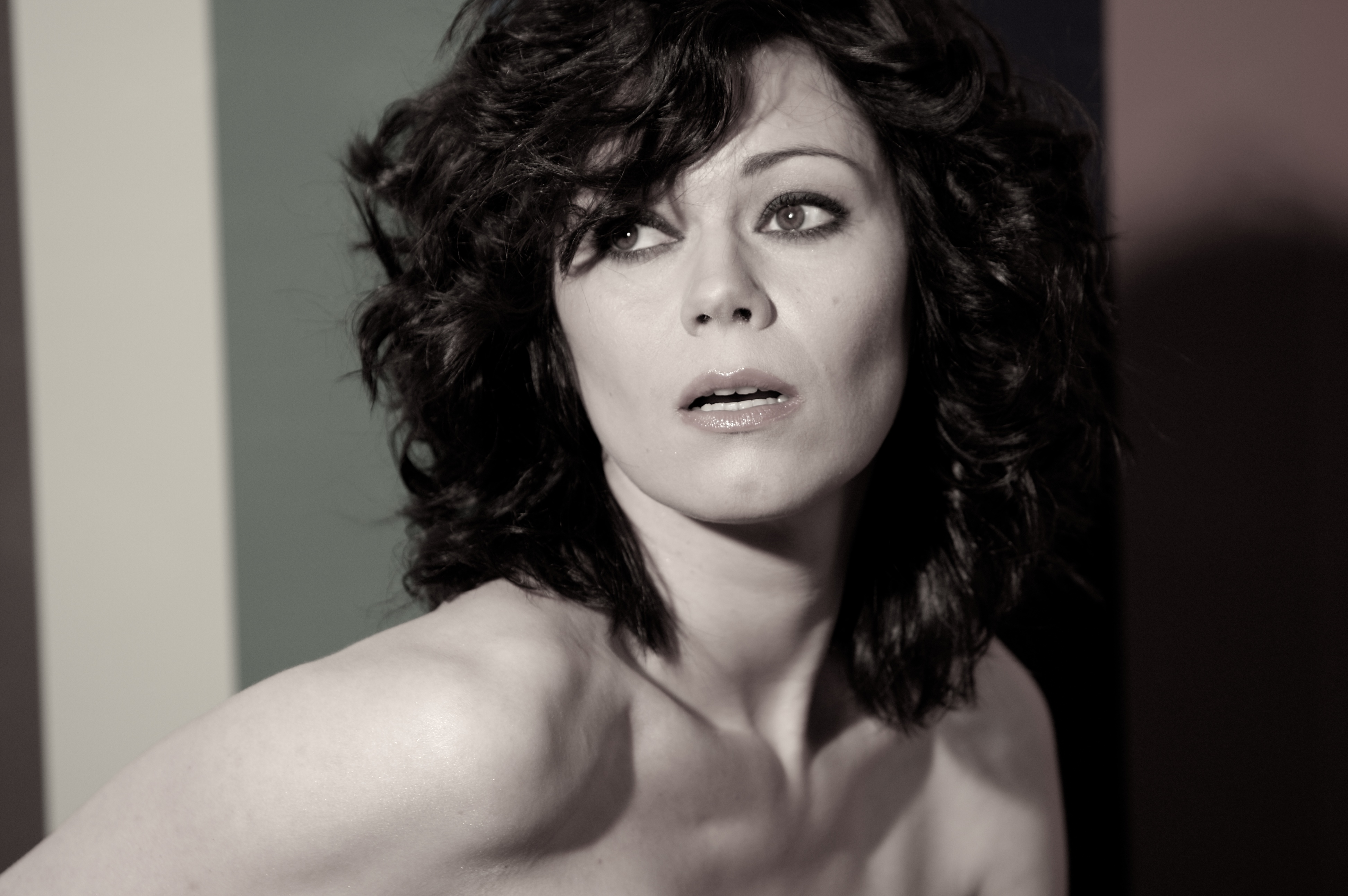 Magdalena Nieć portret aktorki